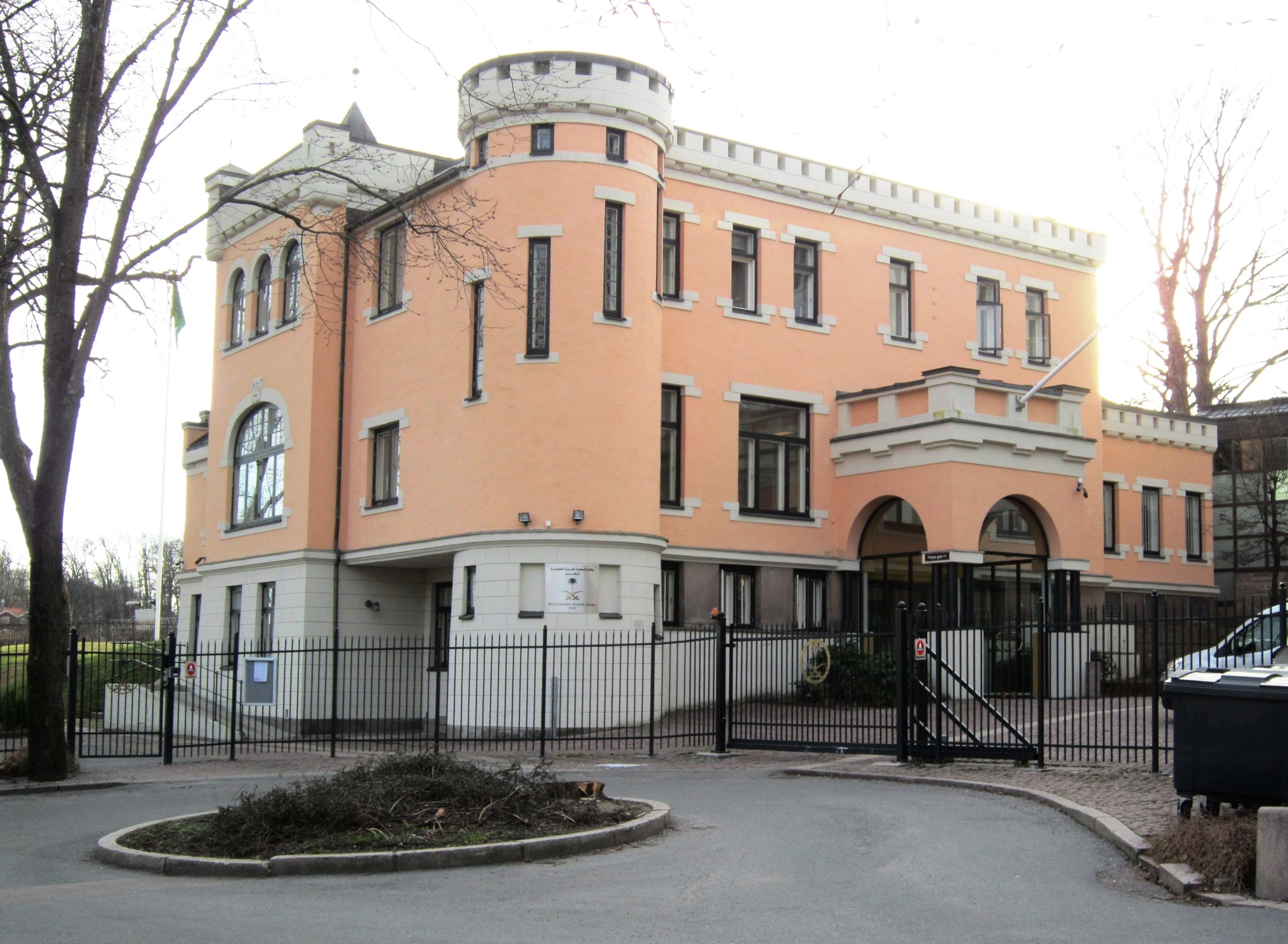 Drammensveien 102H (eller Frøyas gate 11), med Saudi-Arabias ambassade. Arkitekt: Ingvar Hjorth.